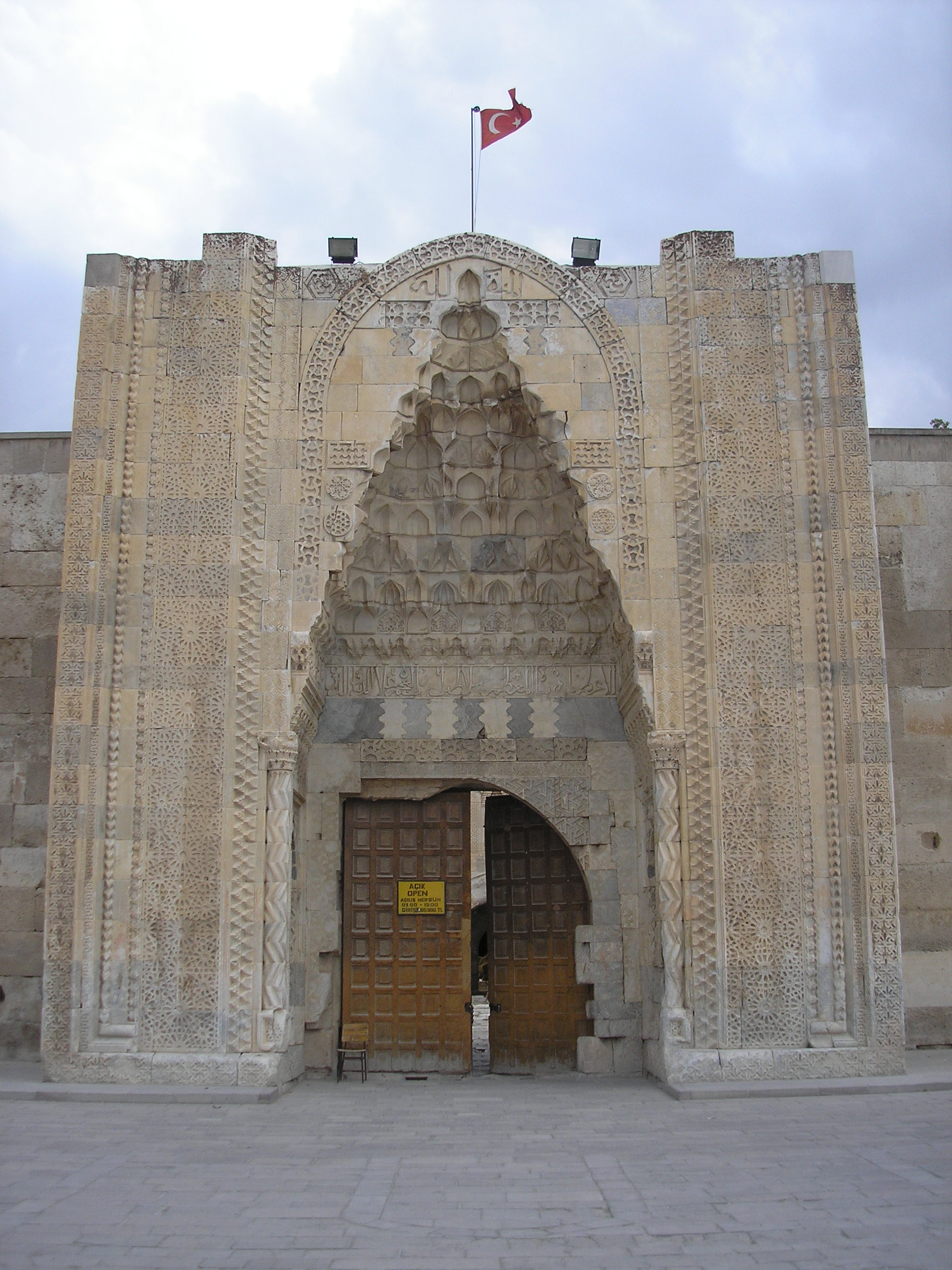 Portal von Sultanhani